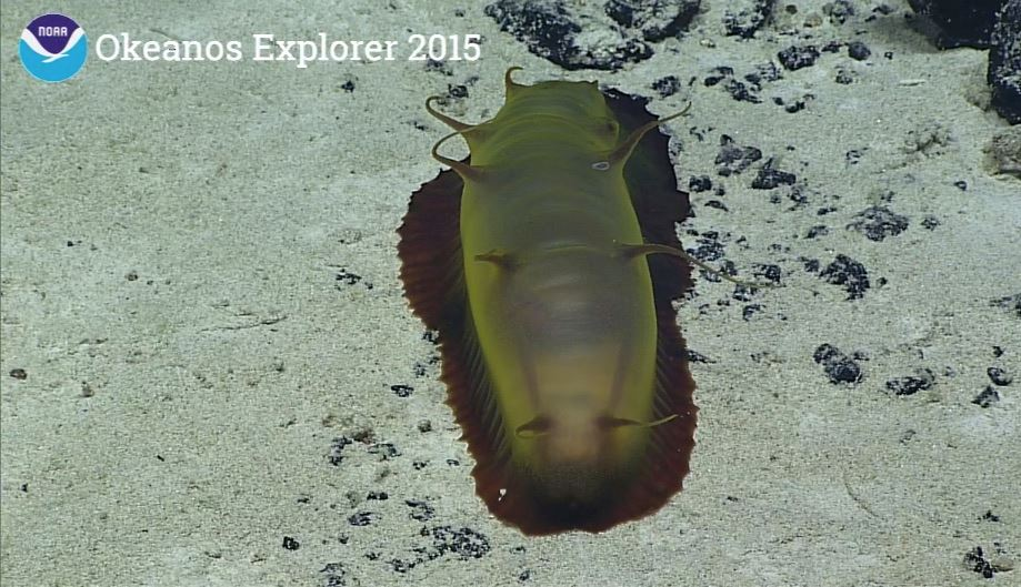 A deep-sea sea cucumber (Benthodytes sp.) observed off Hawaii.